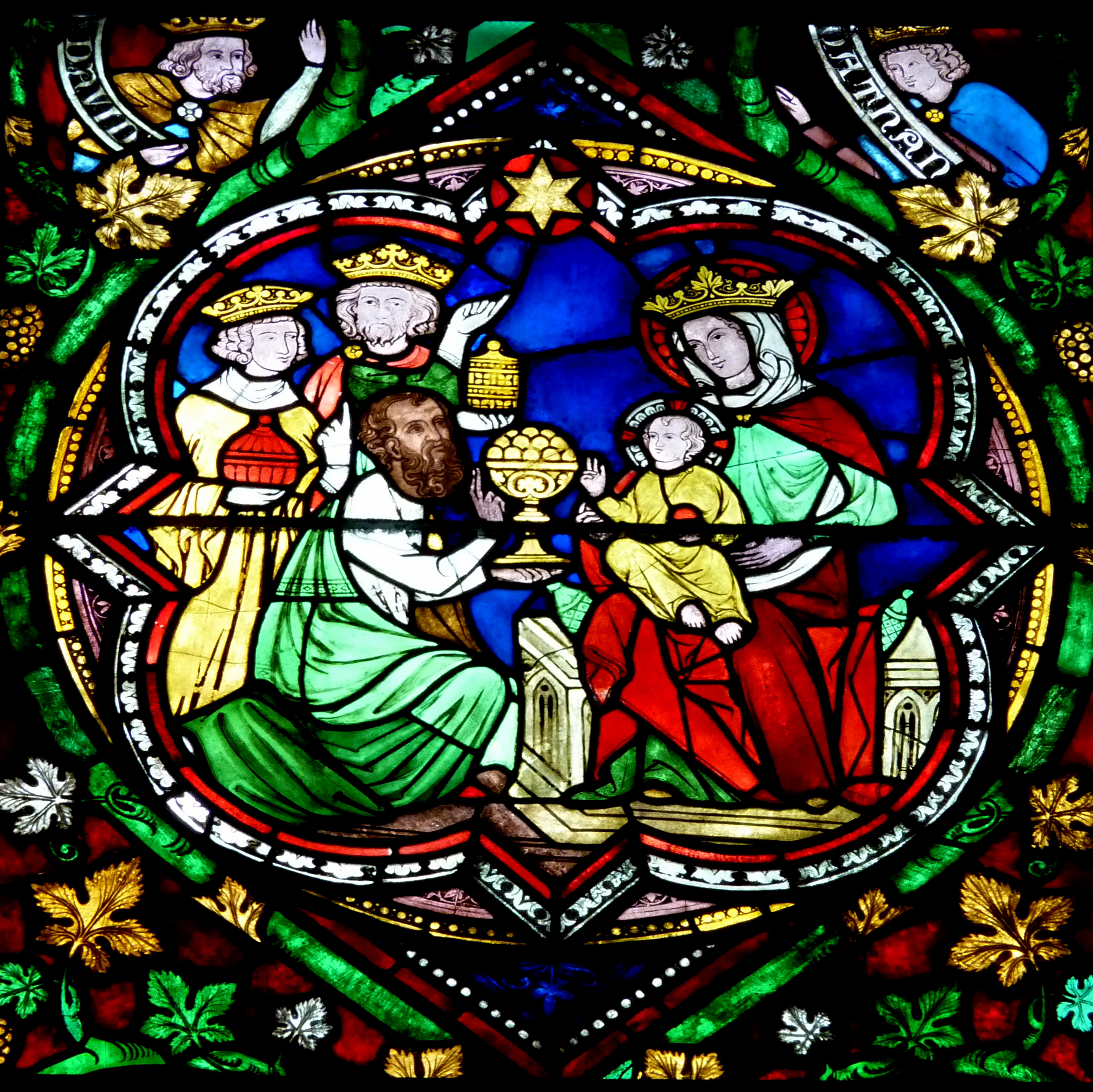 Scheibe aus dem "Jüngeren Bibelfenster" im Chor des Kölner Doms, Darstellung: Anbetung der Könige, Entstehung um 1280